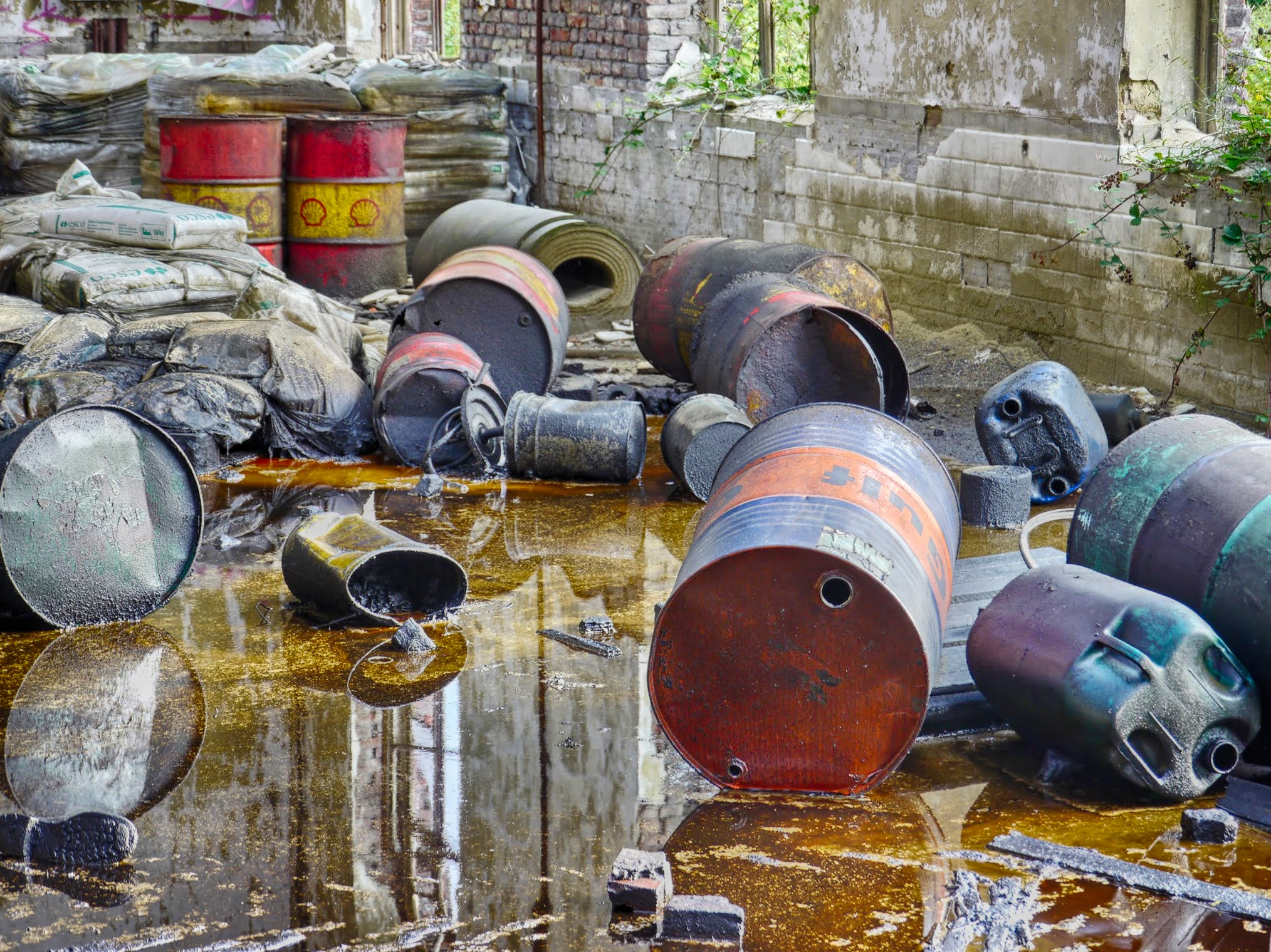 Altlast – Umweltbelastung durch Industrieöle (unsachgemäß entsorgte Ölgebinde) auf einer Industriebrache